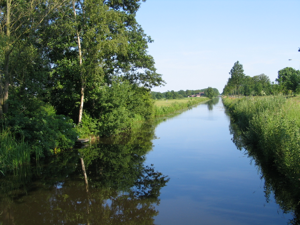 Bakkeveenstervaart, onderdeel van de Drachtster Compagnonsvaart